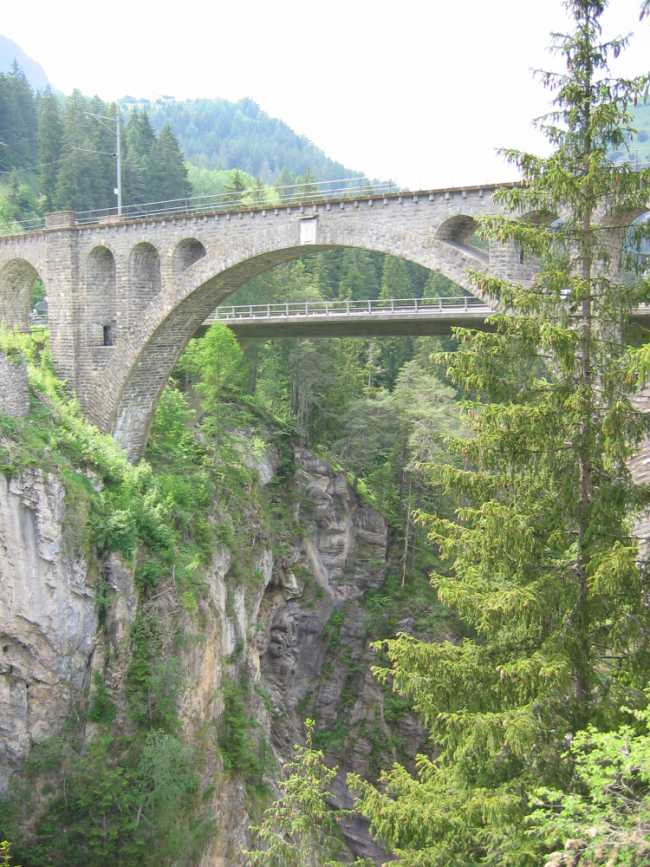 Solisbruecke der Rhaetischen Bahn